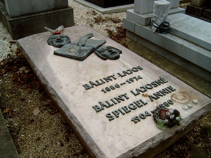 Bálint Lajos sírja a budapesti Farkasréti temetőben (25-2-33).